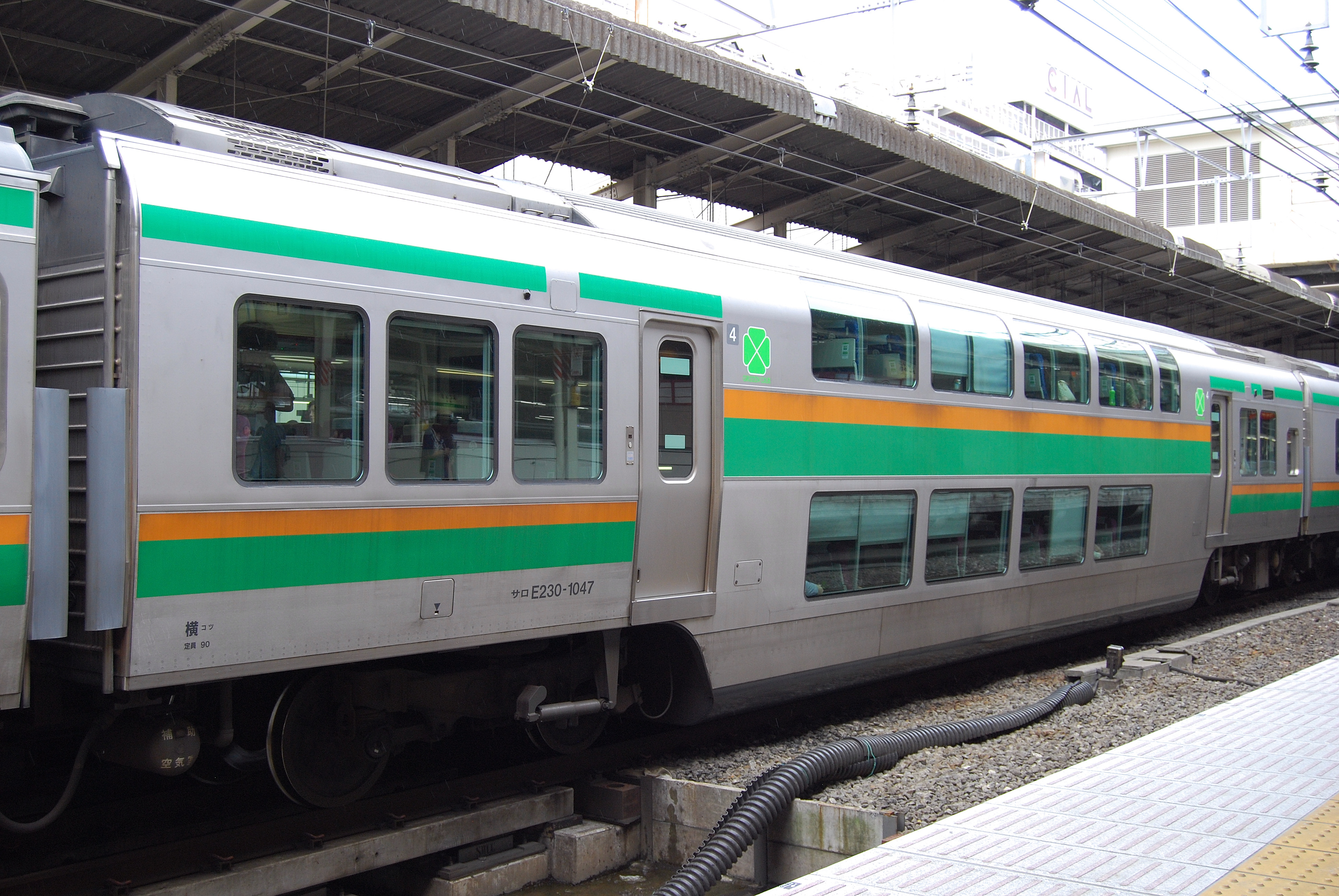 サロ230－1047（横浜駅）